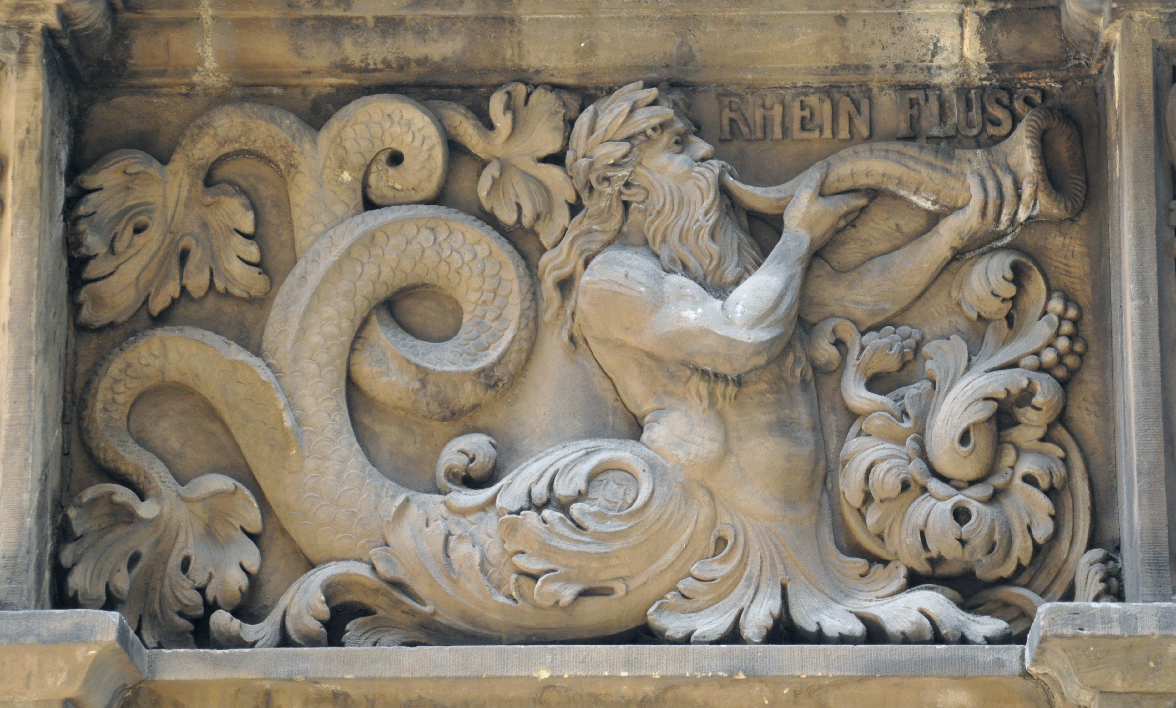 Duisburg, Rathaus am Burgplatz, Rathausbogen, Portal im Rathausbogen, Detail: Relief „Rheinfluss“